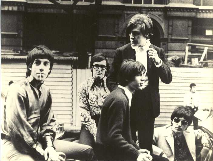 Los Gatos en un auto